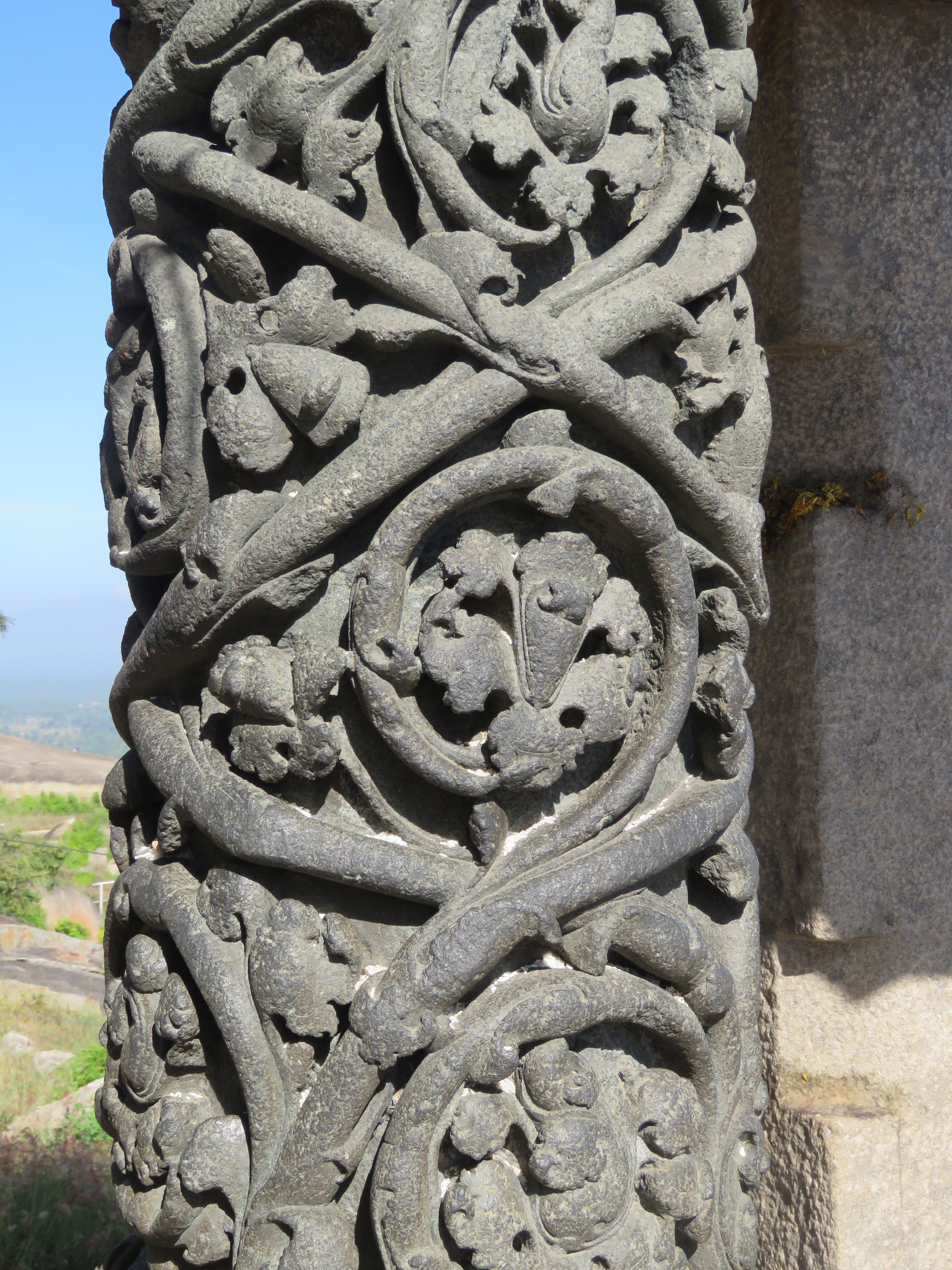 Photos from Shravanabelagola by Vinayaraj 2018